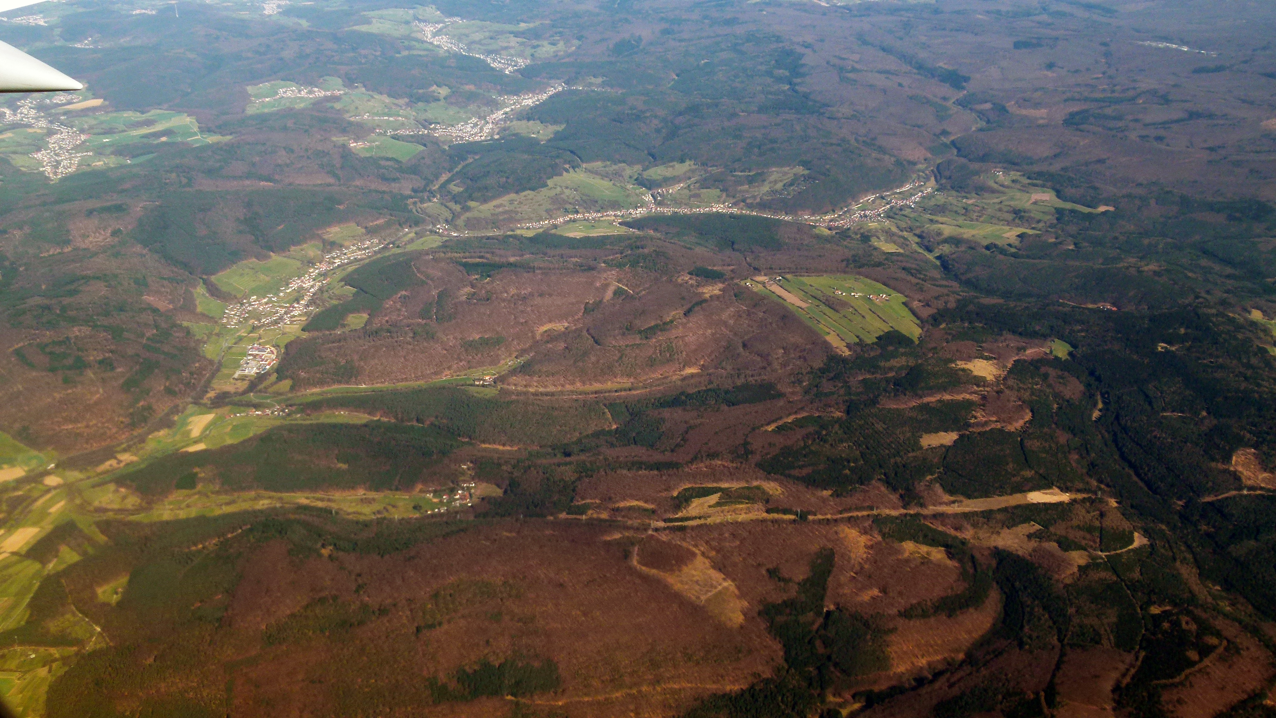 Luftbild vom Spessart mit Blick auf Eschau-Hobbach-Dammbach